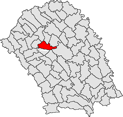 Categorie:Hărţi ale judeţului Botoşani